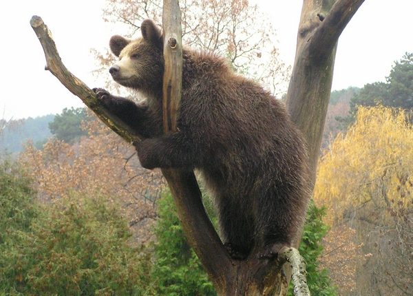 Medveď hnedý, ZOO Bojnice